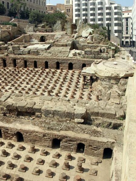 نسخت من نسخت من